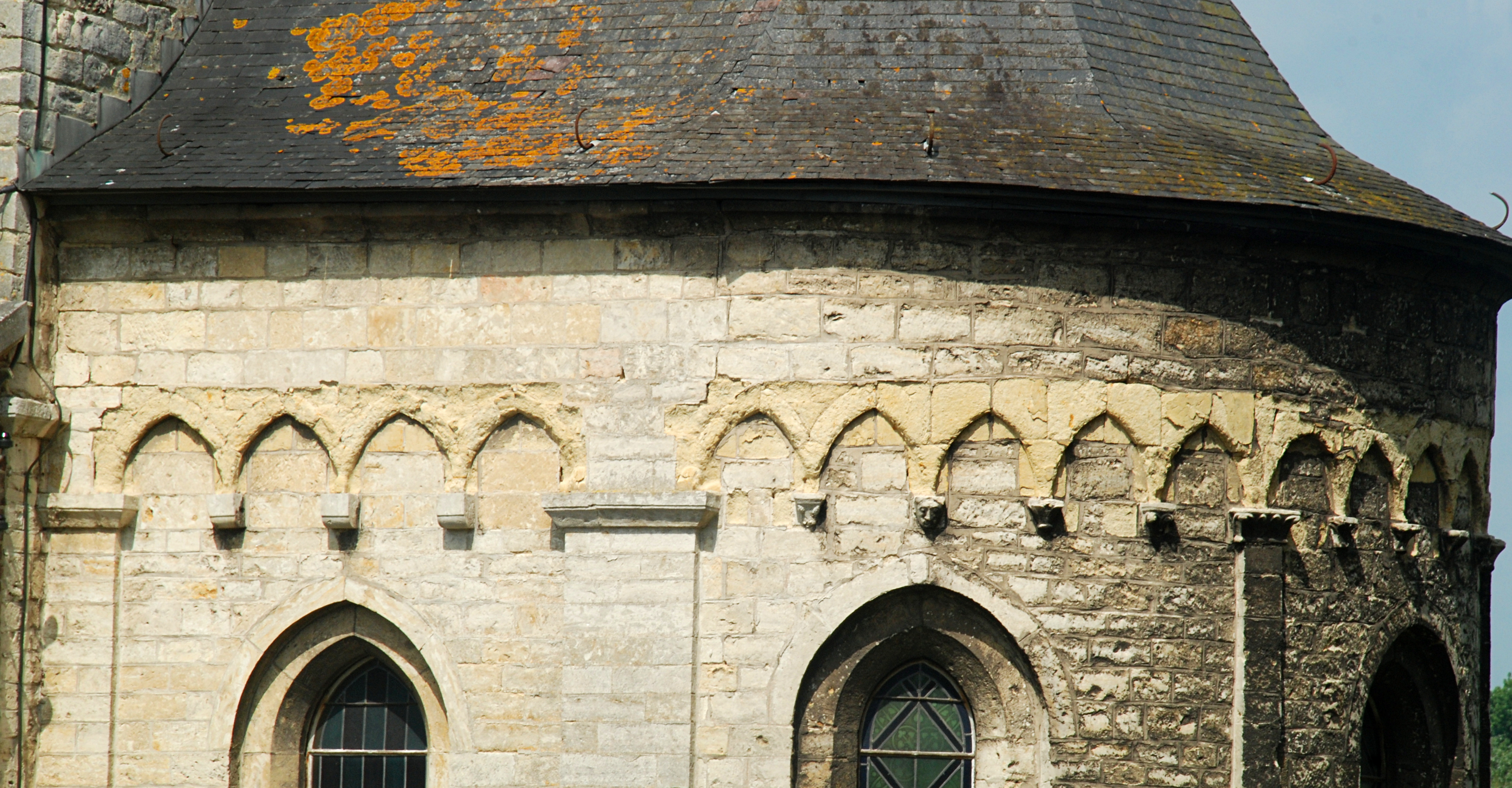 Belgique - Brabant wallon - Jodoigne - Église Saint-Pierre de Sainte-Marie-Geest